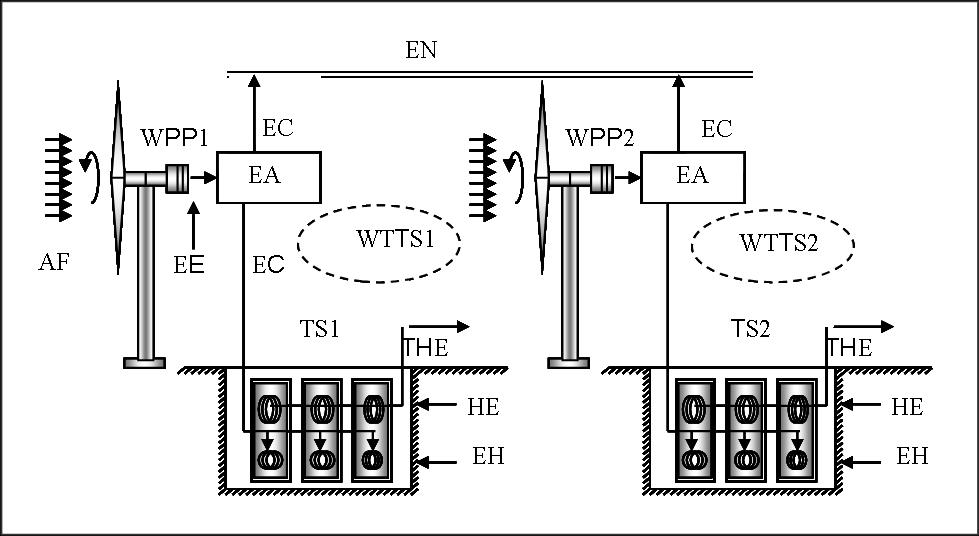 Багатосекційні вітротурбінні системи теплопостачання з підземним розташуванням теплових акумуляторів